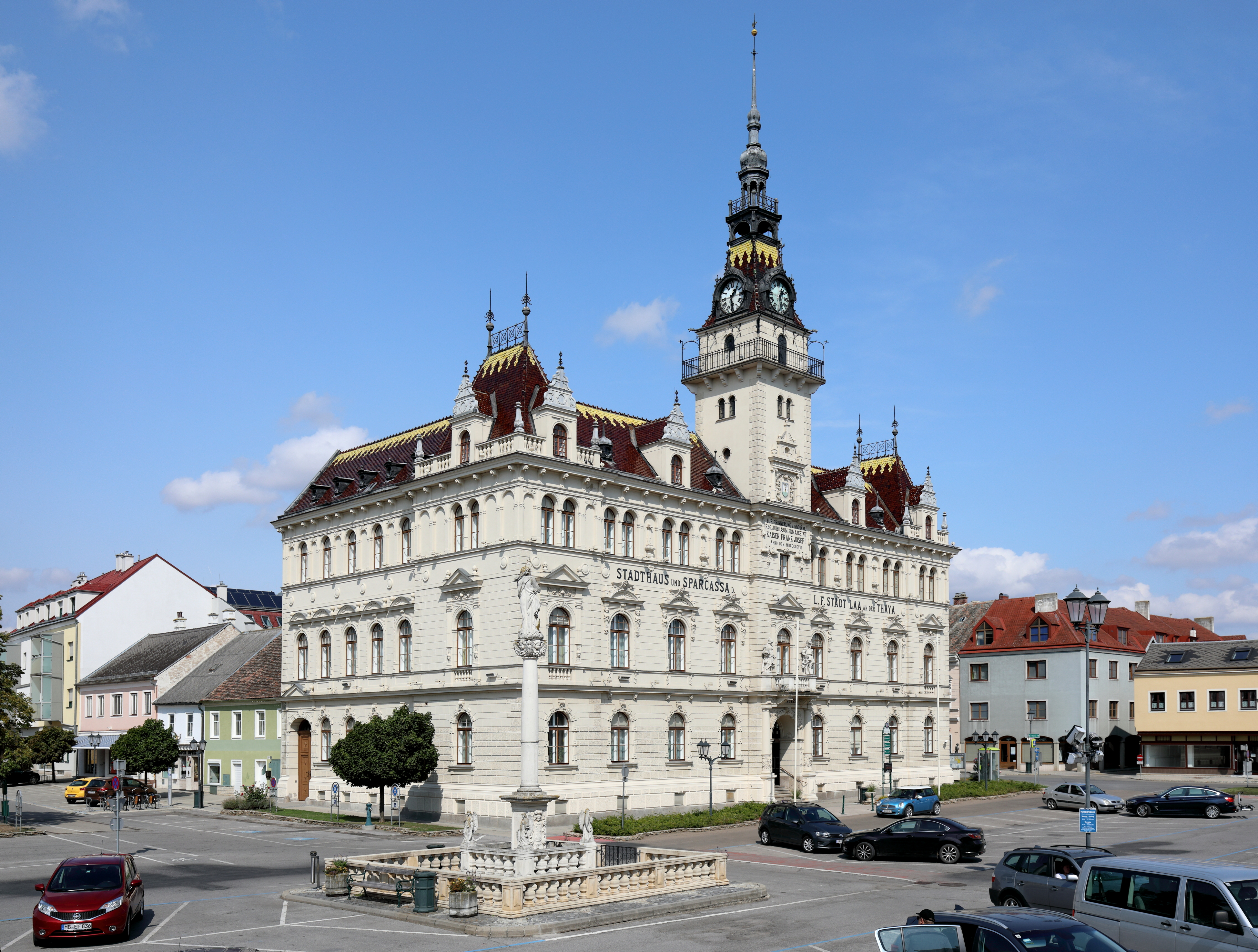 Südsüdwestansicht des Rathauses der niederösterreichischen Stadt Laa an der Thaya und davor die Mariensäule. Der dreigeschossige Bau mit aufwendiger Gliederung in Spätrenaissance- und manieristischen Formen sowie dominierendem Turm in der Mittelachse wurde 1898/99 nach Plänen des Architekten Peter Paul Brang errichtet.